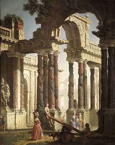 Capriccio